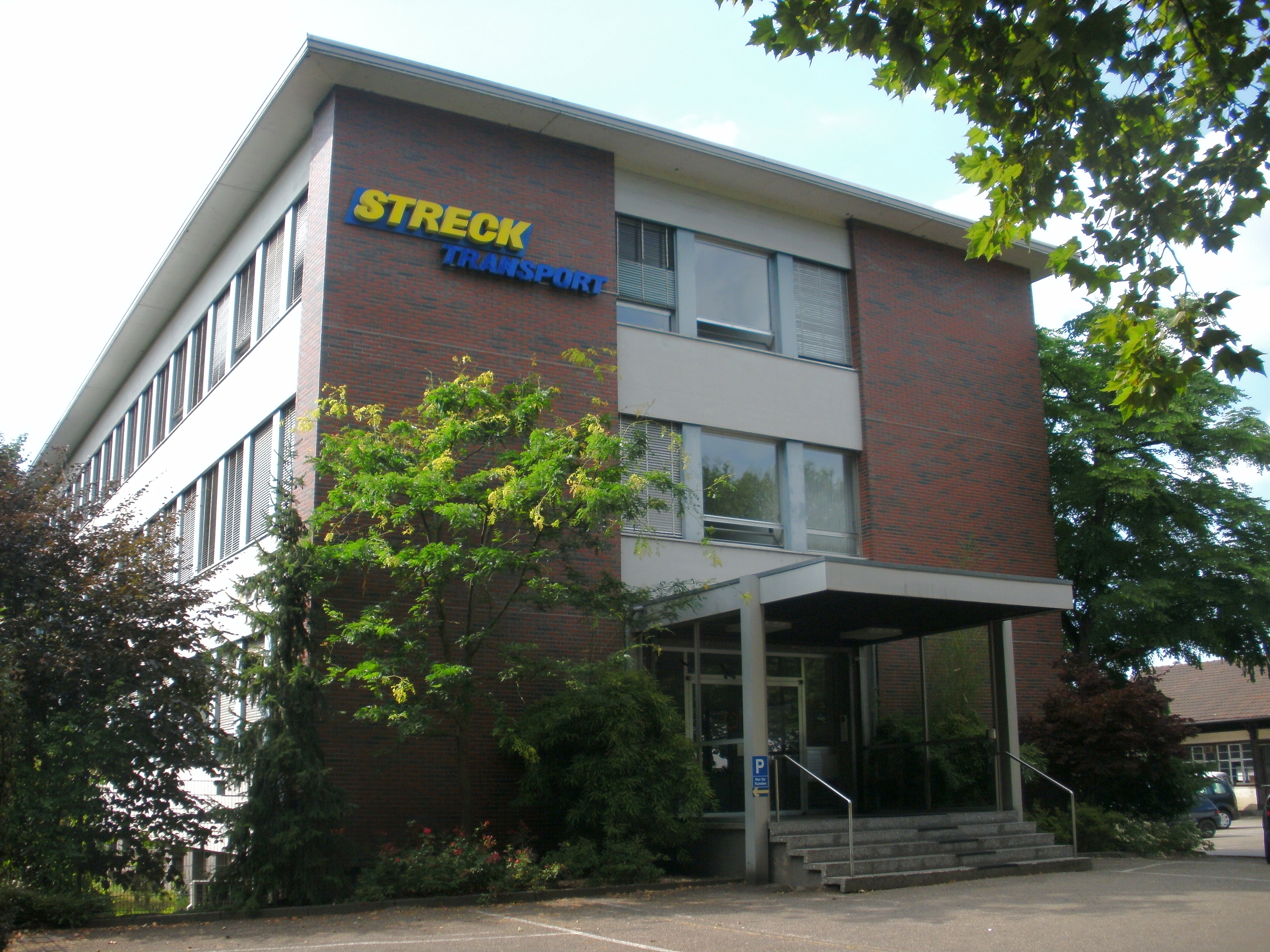 Firmensitz des Unternehmens Streck Transport in Lörrach.